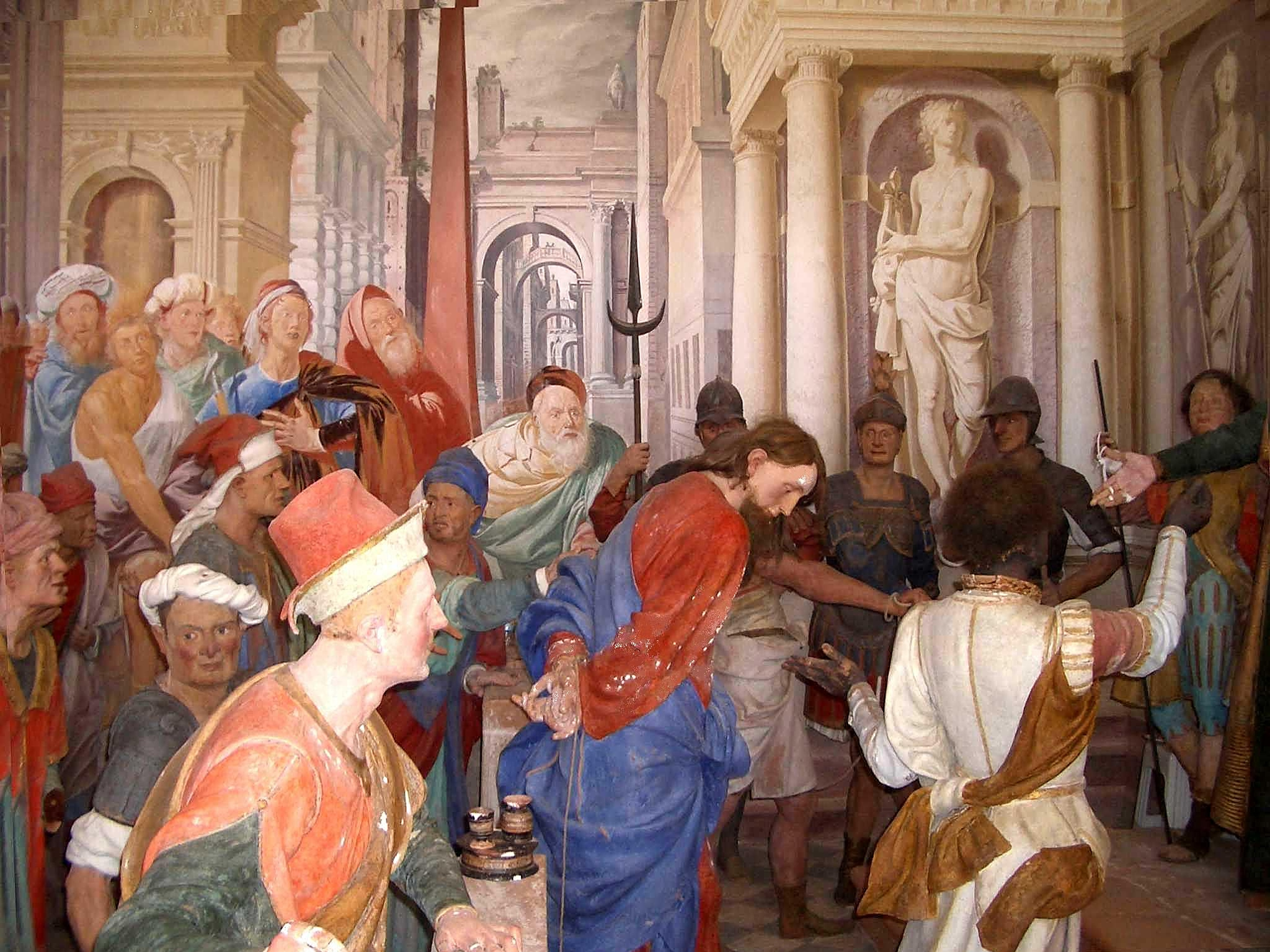 View of a chapel at Sacro Monte di Varallo, Varallo Sesia (VC), Italy Giovanni d’Enrico e Tazio da Varallo, Jesus before Pilate (detail), polychrome clay statues and frescos, ca. 1615, Chapel XXVII